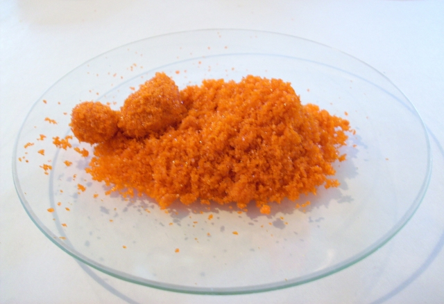 Na2Cr2O7